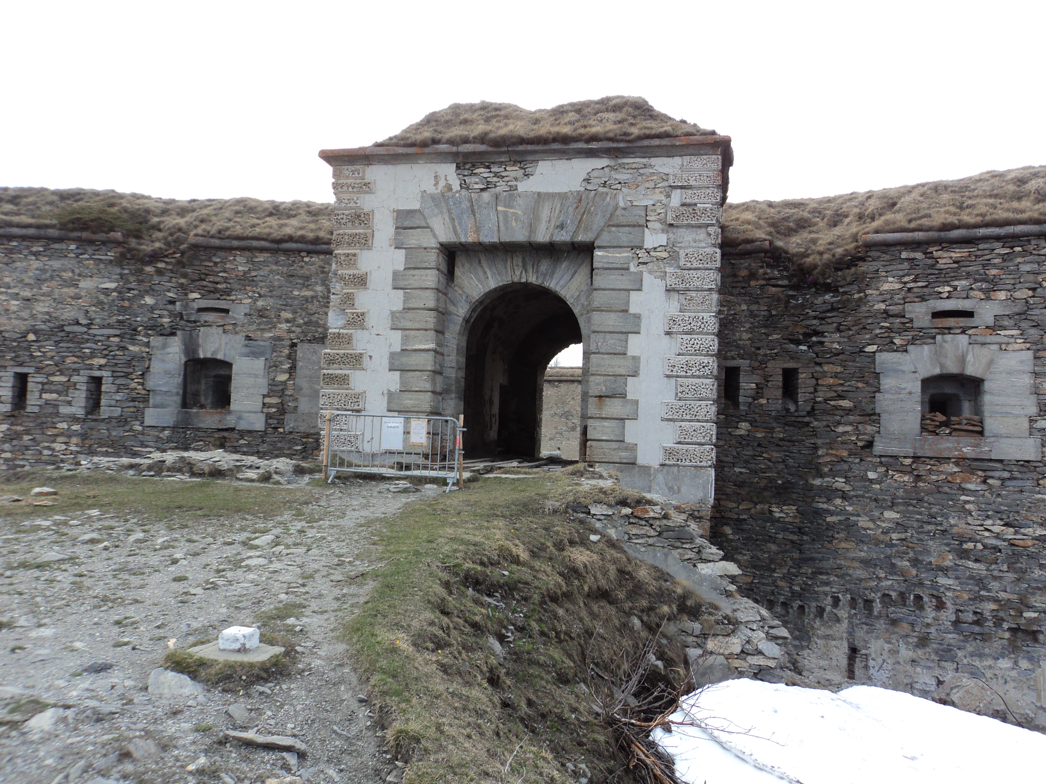 Il Forte Varisello (ingresso). In fianco al Lago del Moncenisio. Savoia. Francia